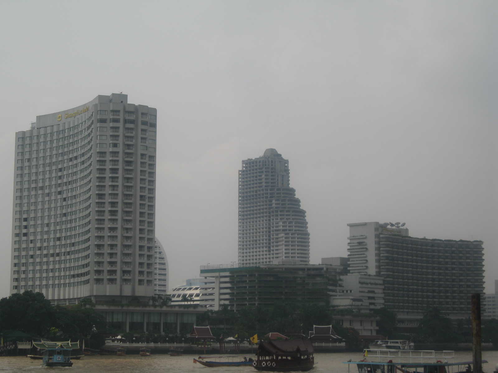 Shangri-La Hotel Bangkok. Taken by Terence Ong in June 2006.